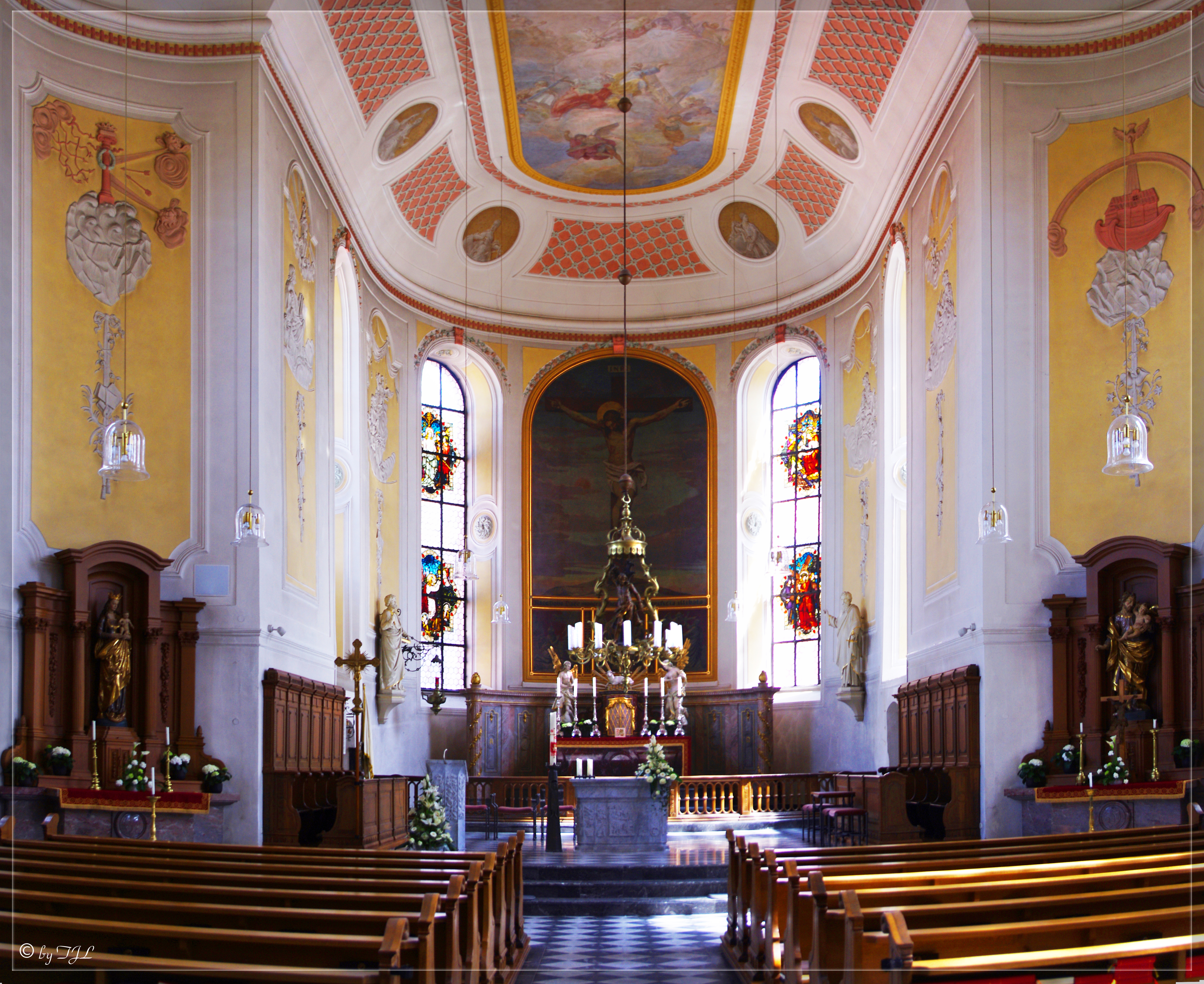 Panoramaview Apsis St. Peter und Paul